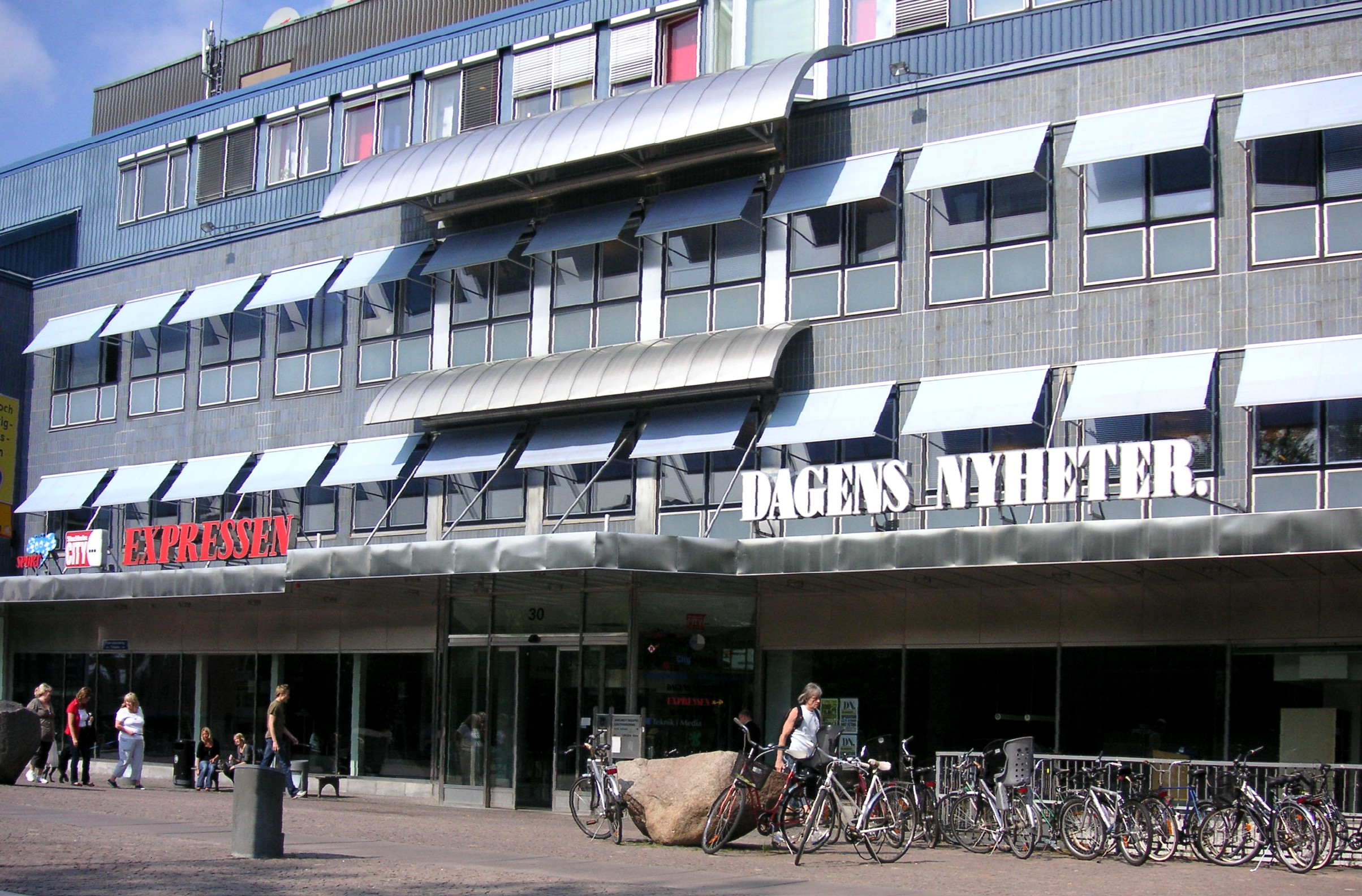 Huvudingång till Dagens Nyheter